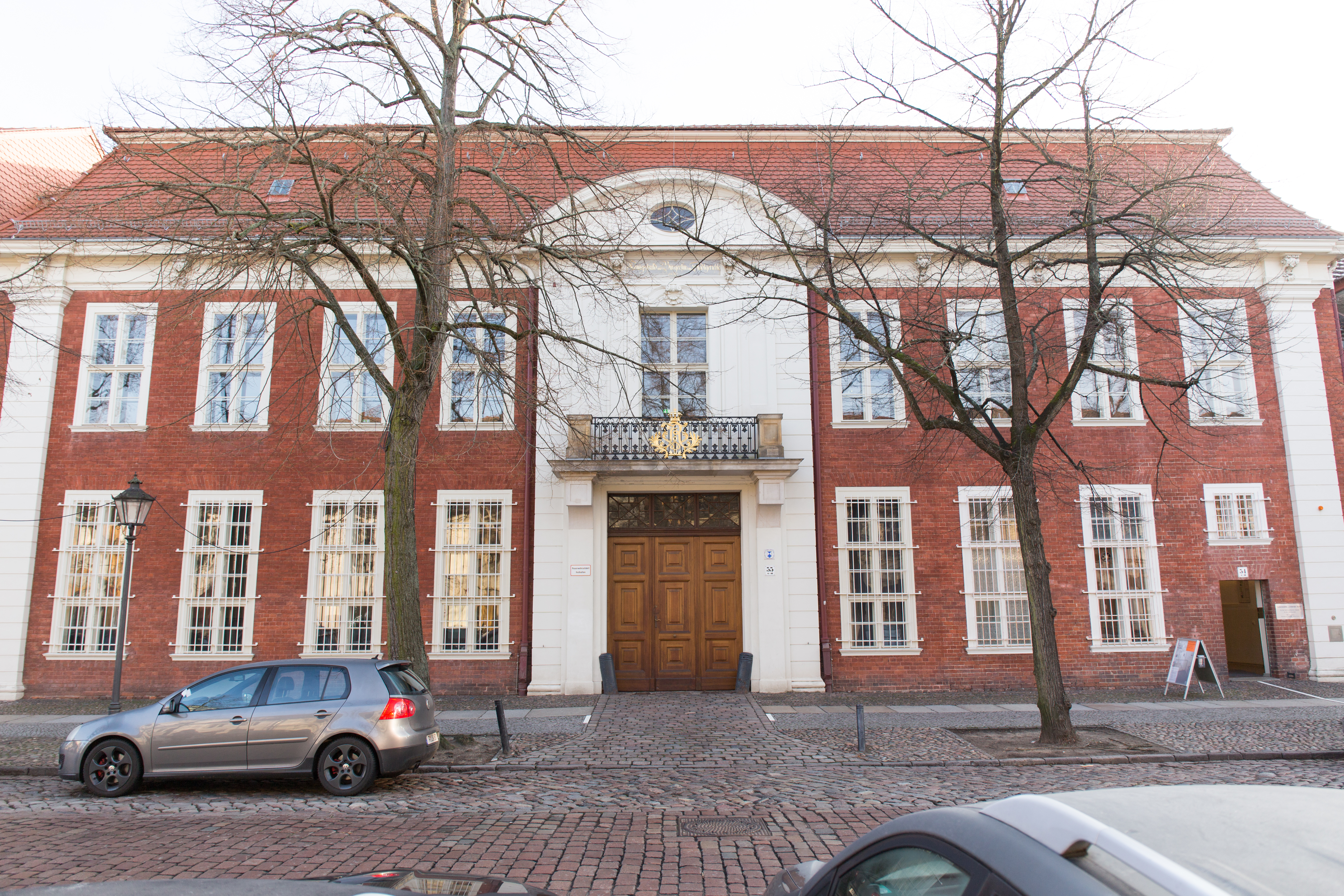 Führung durch Potsdam anläßlich von Hundert Jahre Frauenwahlrecht; Gedenkstätte Lindenstraße 54/55 in Potsdam (das sogenannte "Lindenhotel").